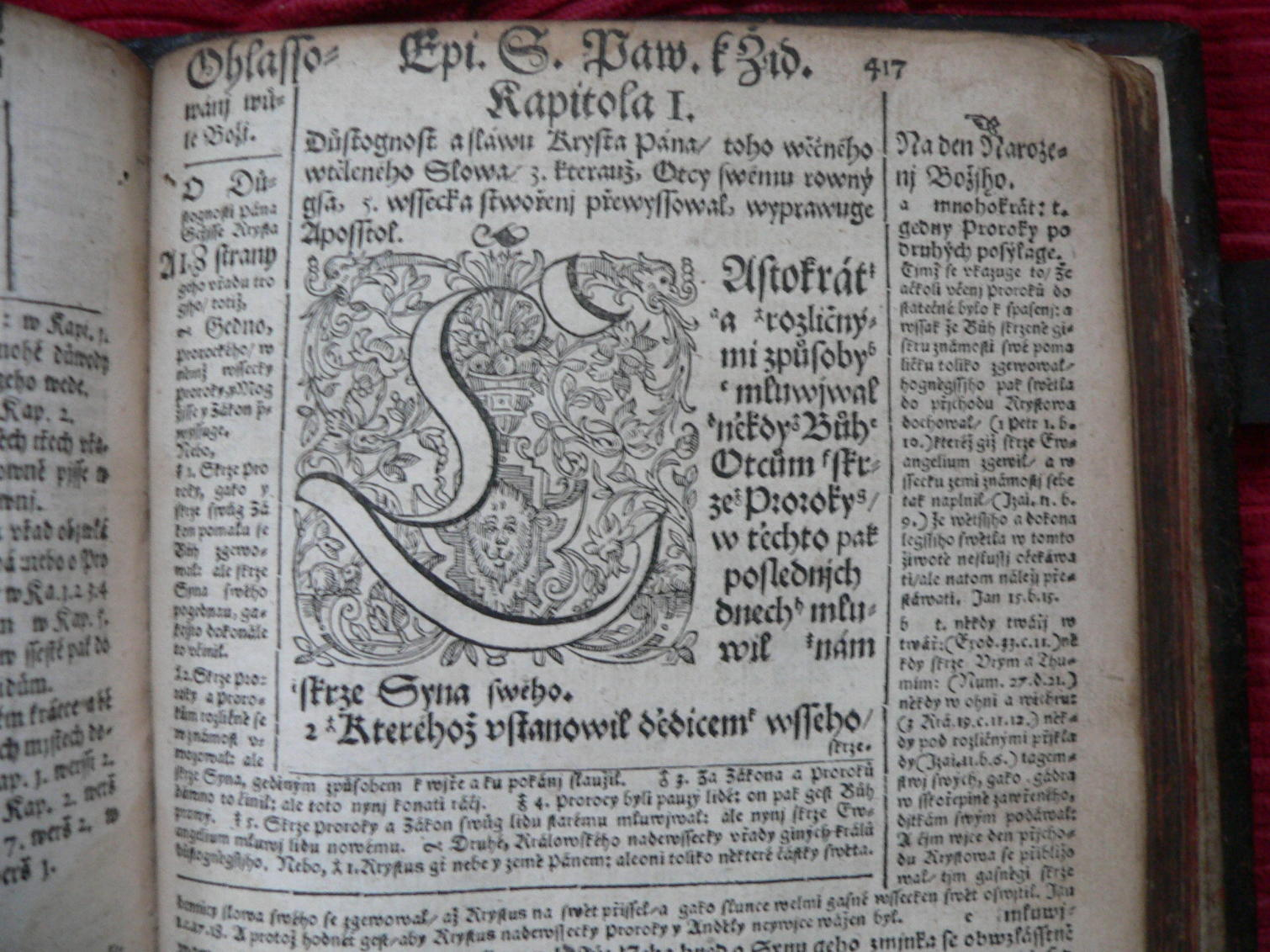 Bible Kralická - 3. vydání z roku 1601. VI. díl, Nový Zákon